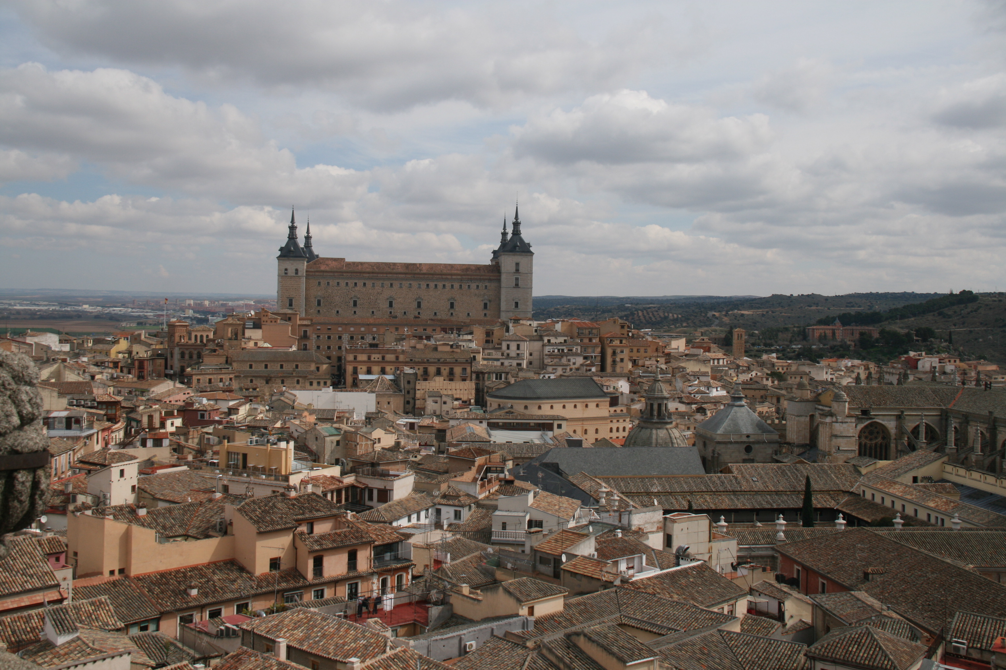 Vista de Toledo desde la Iglesia de San Ildefonso